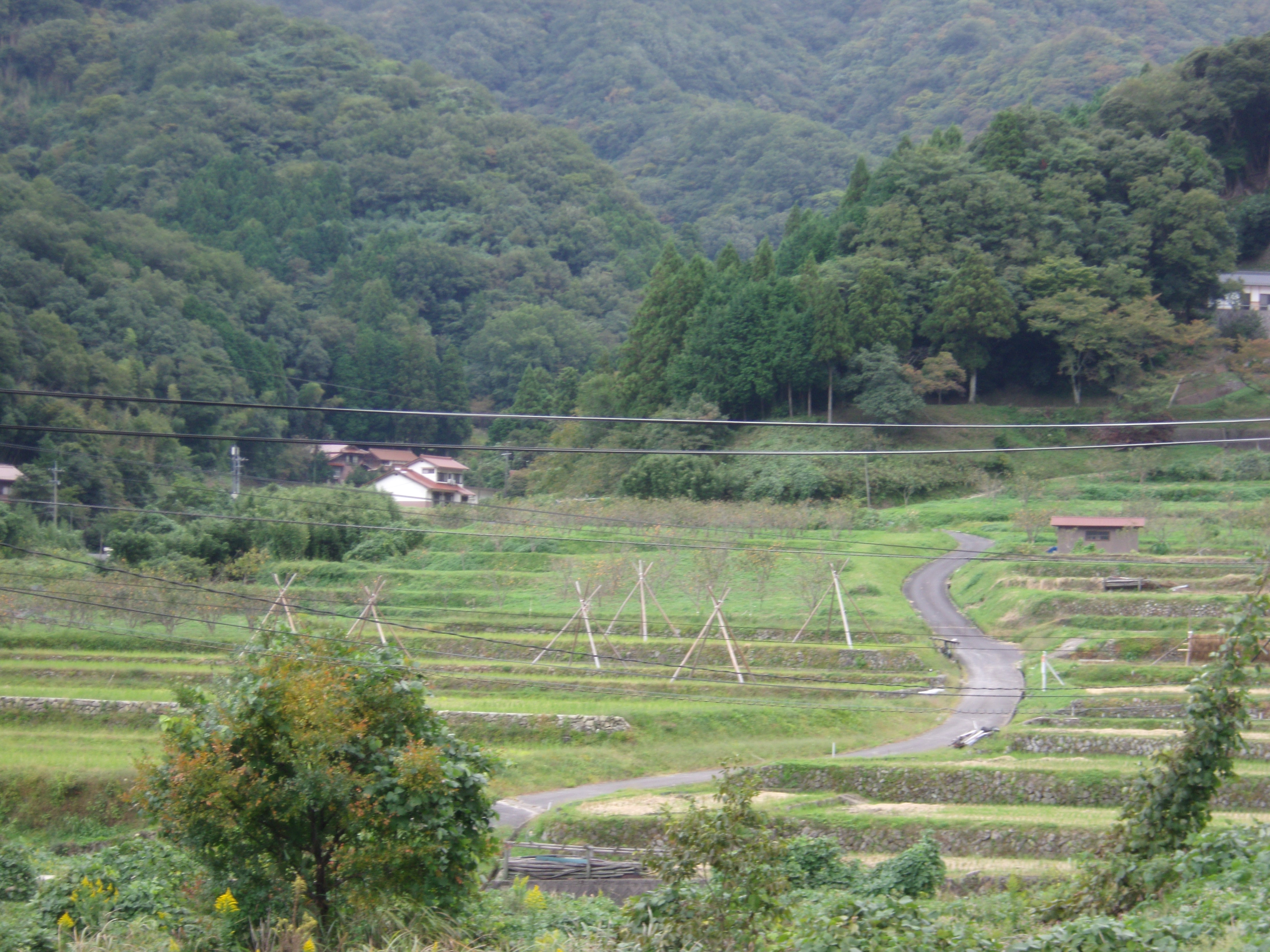 世界遺産「石見銀山」の構成資産である銀山街道温泉津沖泊道 西田の棚田